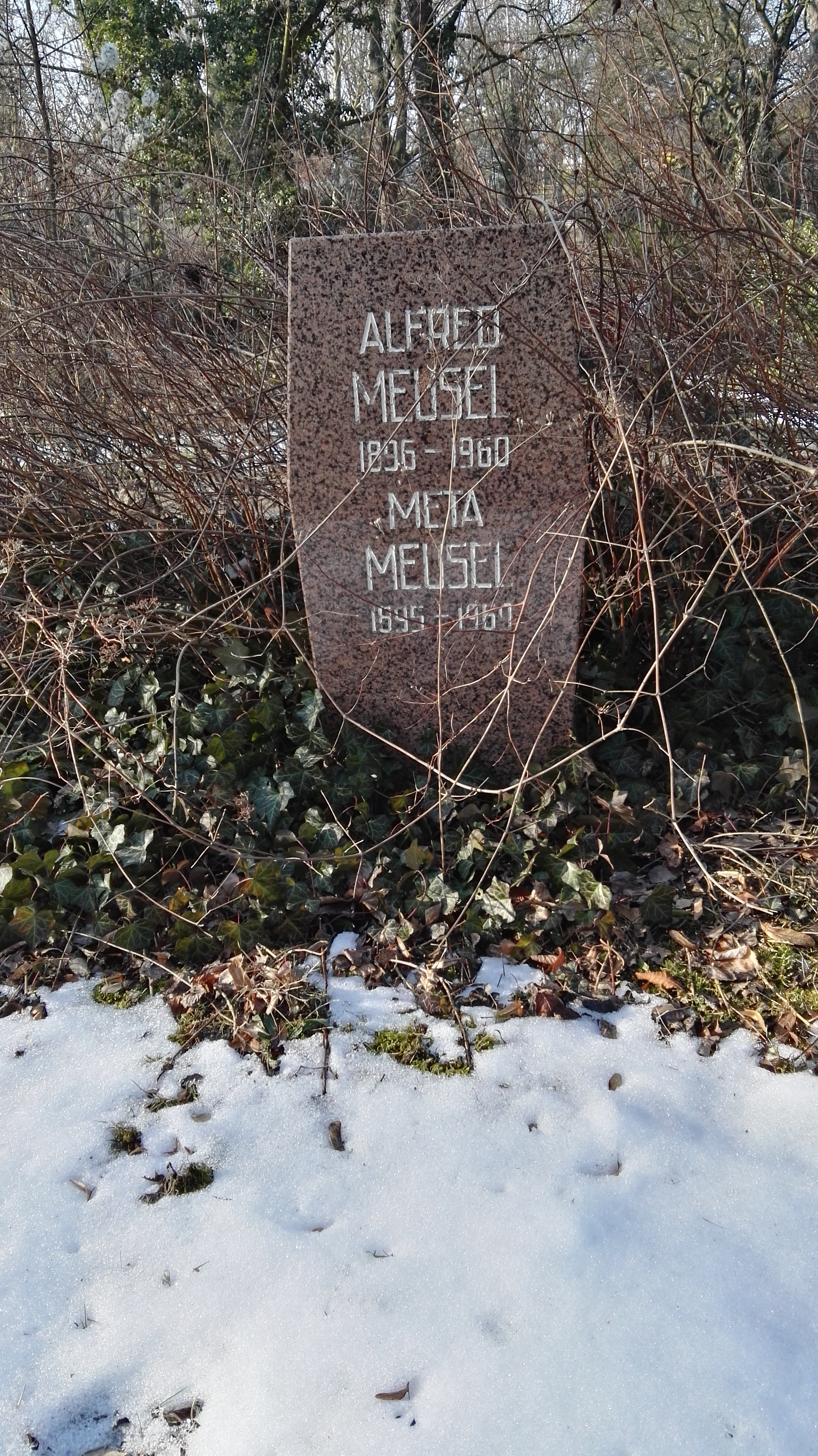 Grab von Alfred Meusel und Meta Meusel in der Grabanlage Pergolenweg auf dem Sozialistenfriedhof des Zentralfriedhofs Friedrichsfelde